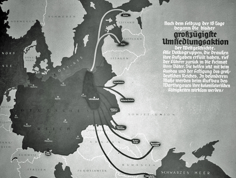 Nach dem Feldzug der 18 Tage begann die bisher großzügigste Umsiedlungsaktion der Weltgeschichte. Alle Volksgruppen, die Draußen ihre Aufgaben erfüllt haben, rief der Führer zurück in die Heimat ihrer Väter. Sie helfen jetzt mit beim Ausbau und der Festigung des großdeutschen Reiches. In besonderem Maße werden beim Aufbau des Warthegaues ihre kolonisatorischen Fähigkeiten wirksam werden.